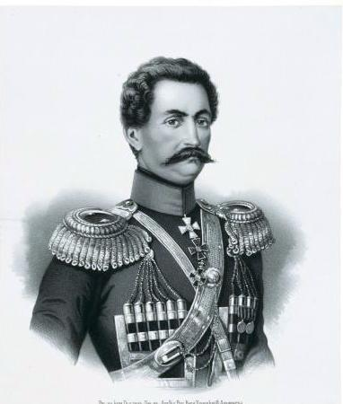 Kniaz' Iason Ivanovich Chavchavadze, General- Maior, Komandir Dragunskago E.K.V. Naslednago Printsa Virtembergskago polka.